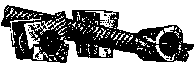 Зажимный аппарат, разбитый после алюминотермической сварки